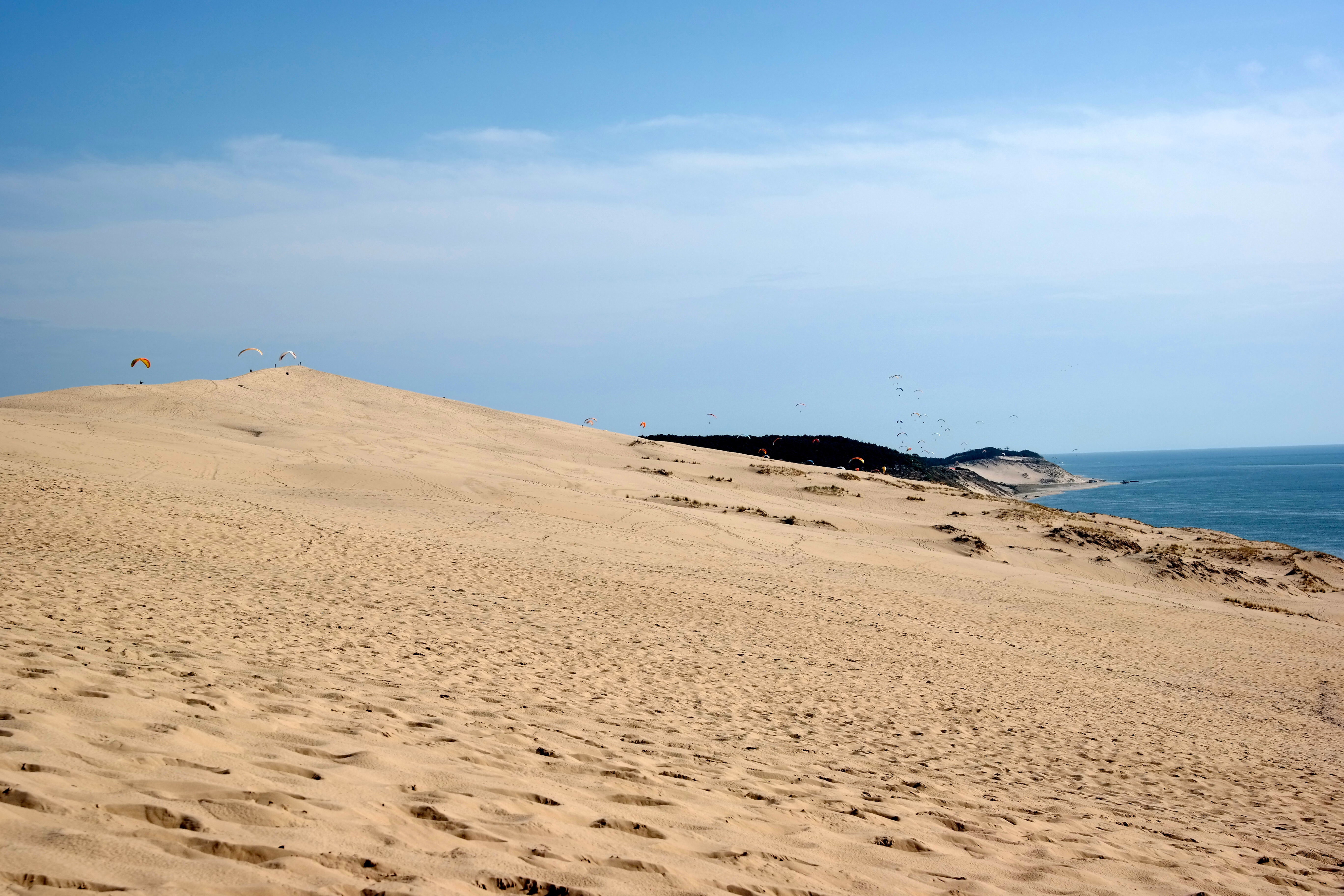 Dune du Pyla versant Ouest